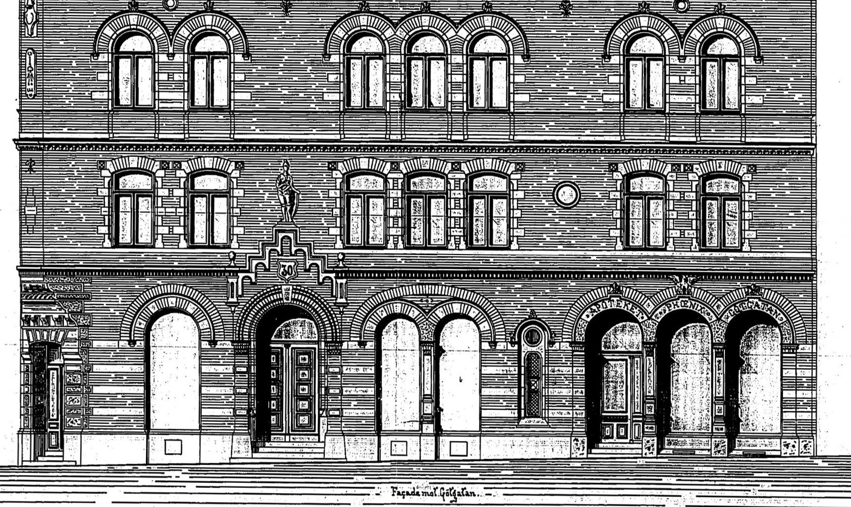 Del av fasadritning mot Götgatan med apoteket Fenix, arkitekt Lars Johan Laurentz